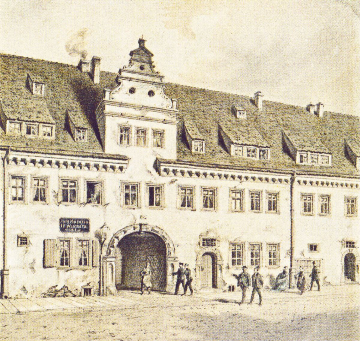 Das Torhaus des städtischen Marstalls in Leipzig, vor 1867